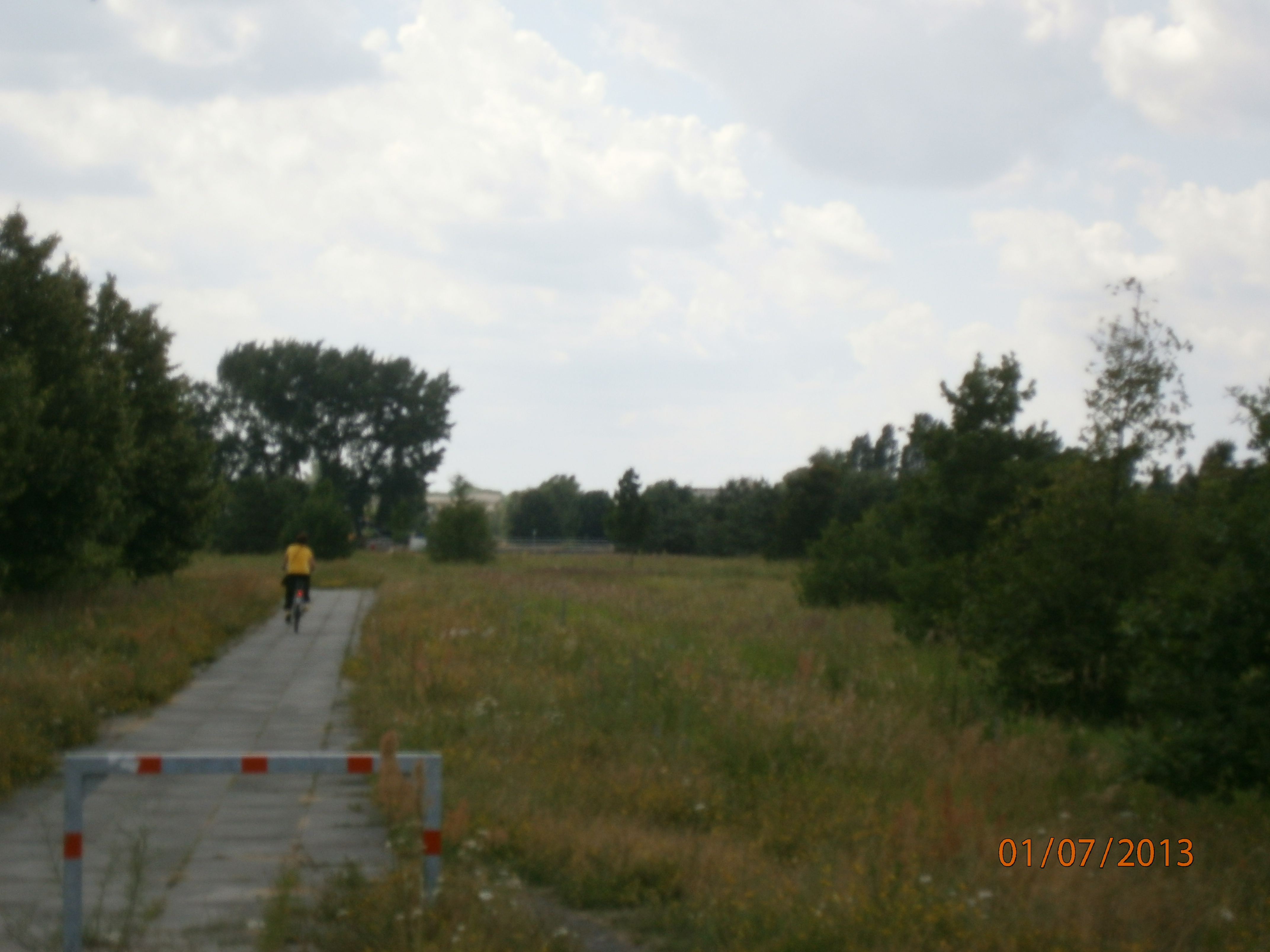 Der Teltower Dörferweg verläuft wie der Barnimer Dörferweg von Dorf zu Dorf. Auf der Teltower Hochfläche im Süden von Berlin geht es im Zick-Zack-Kurs über die Wohngebiete von Zehlendorf, Lichterfelde, Marienfelde, Lichtenrade, Buckow, Rudow und Adlershof. Hier der Blick vom Groß-Berliner Damm zum Landschaftspark.